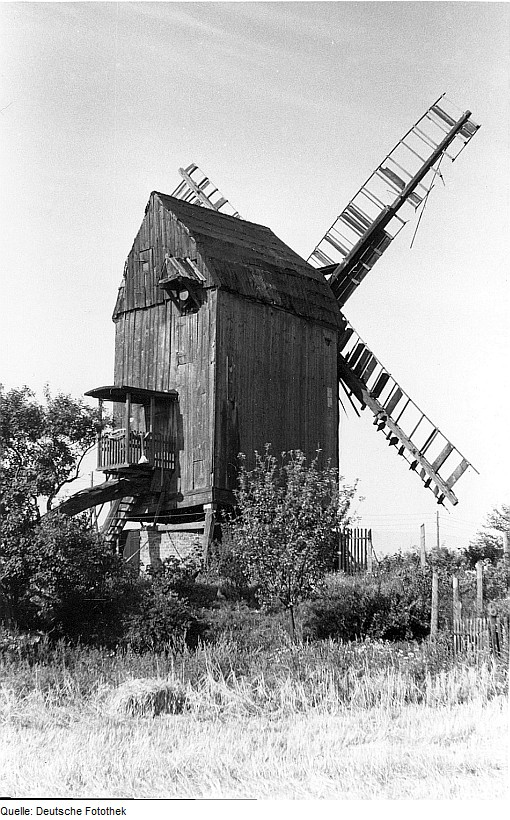 Original image description from the Deutsche Fotothek Drackenstedt. Mühle Michaelis, Bockmühle (1984/85 nach Hohenwarthe, Landkreis Jerichower Land, umgesetzt)